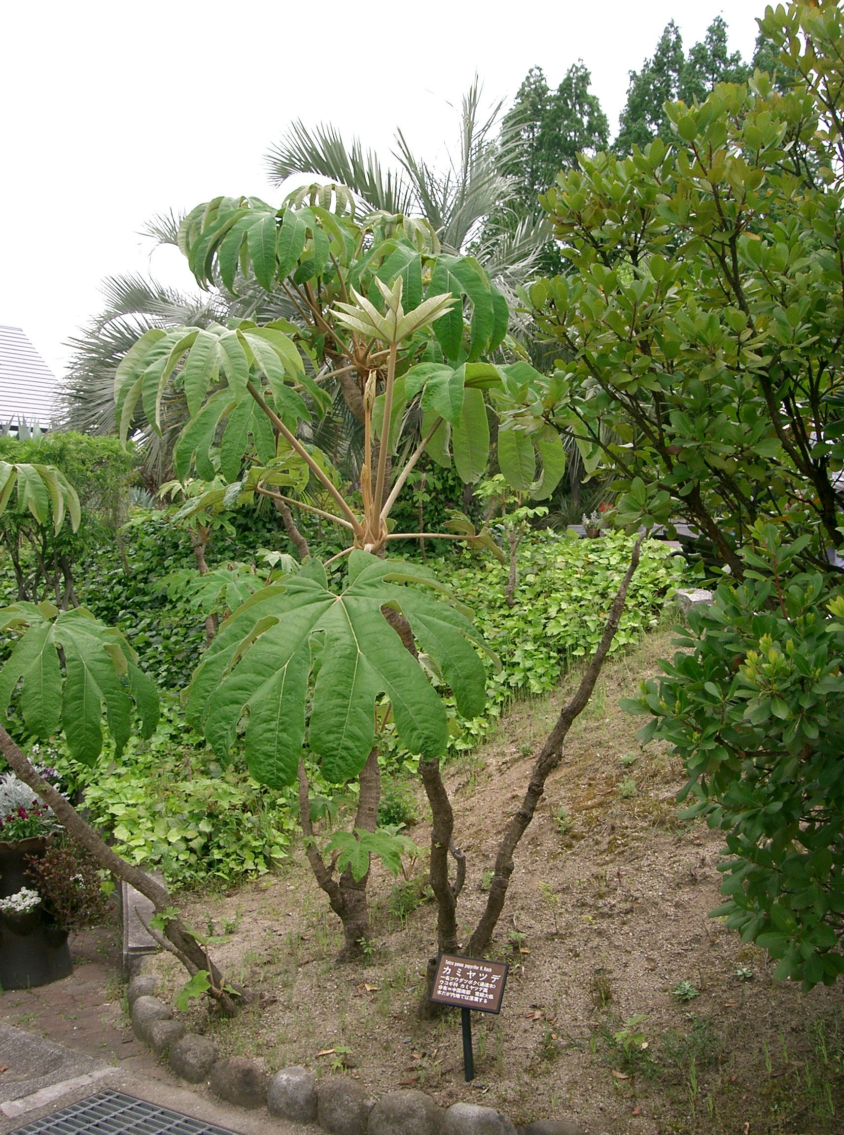 Tetrapanax papyrifer